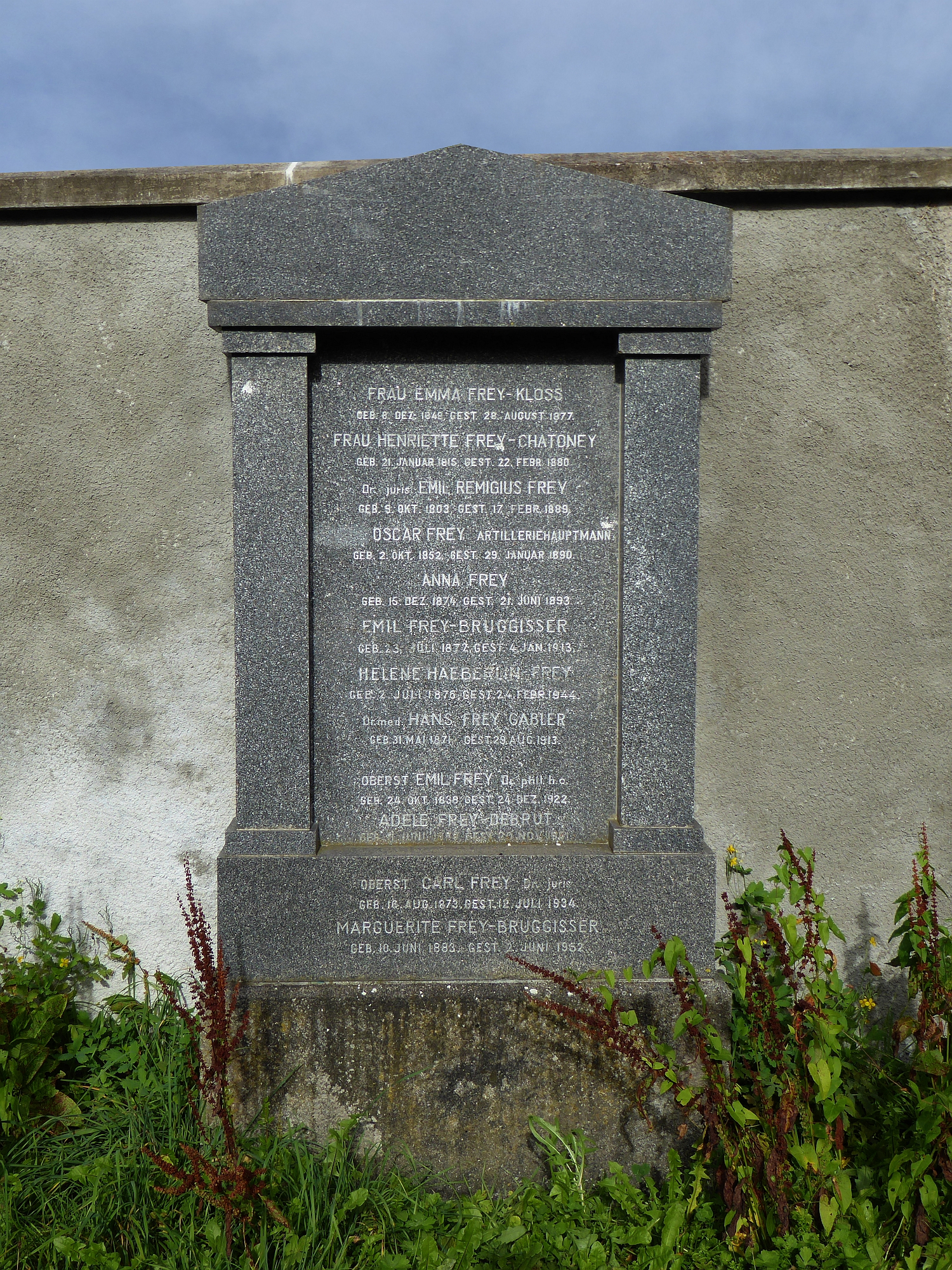 Emil Johann Rudolf Frey (1838–1922) Politiker, Dr.phil.h.c., Grab auf dem alten Friedhof von Arlesheim